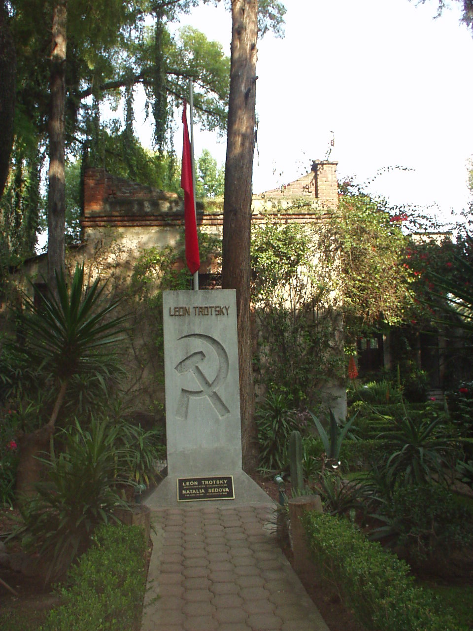 Ciudad de México. Barrio de Coyoacán. En los jardines de su casa está enterrado León Trotsky. Autor: Beatriz Busaniche aka MotherForker Fecha: Octubre de 2004